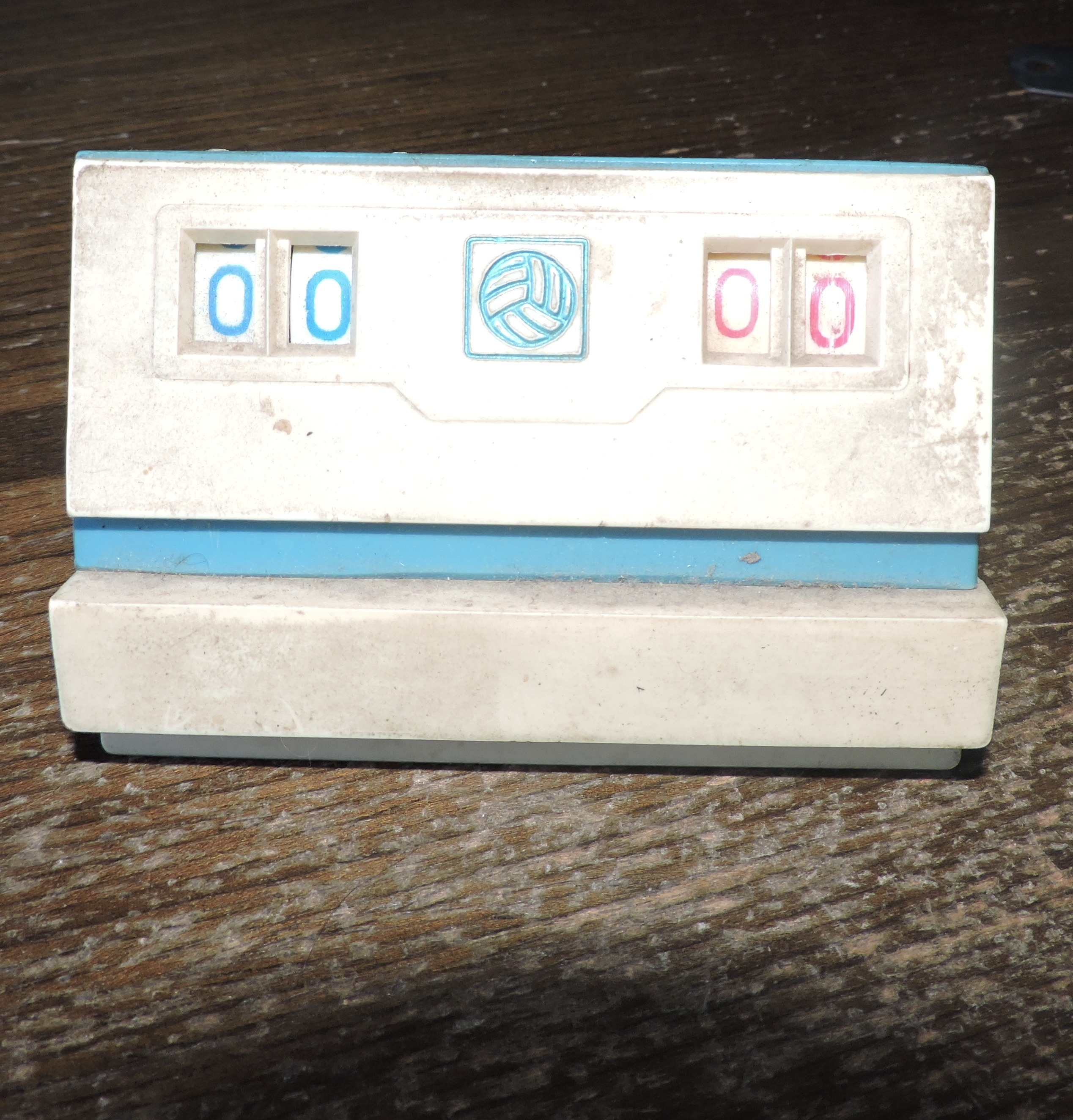 Мини-счётчик для настольного волейбола